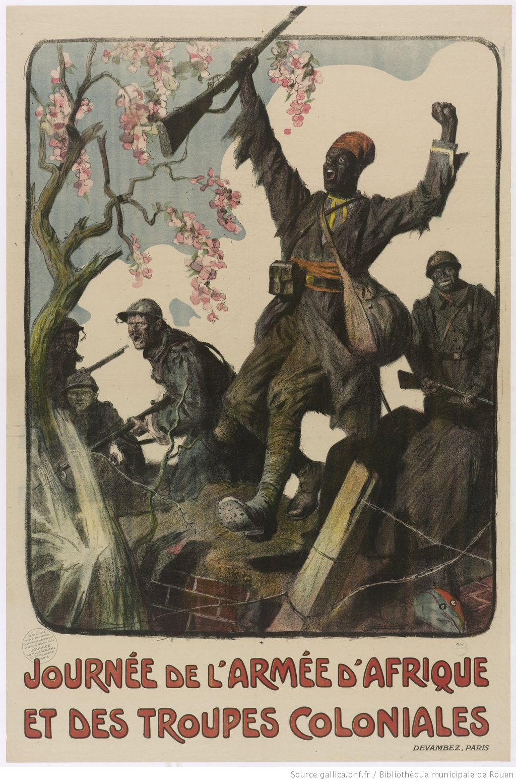 Une affiche